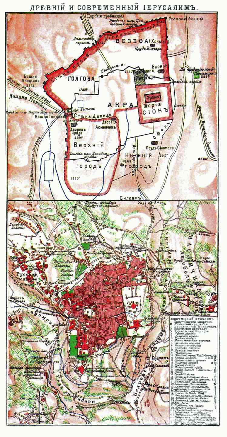 Карта Древнего Иерусалима и карта Иерусалима в 1900 году. Иллюстрация к статье Иерусалим из энциклопедии Брокгауза и Ефрона